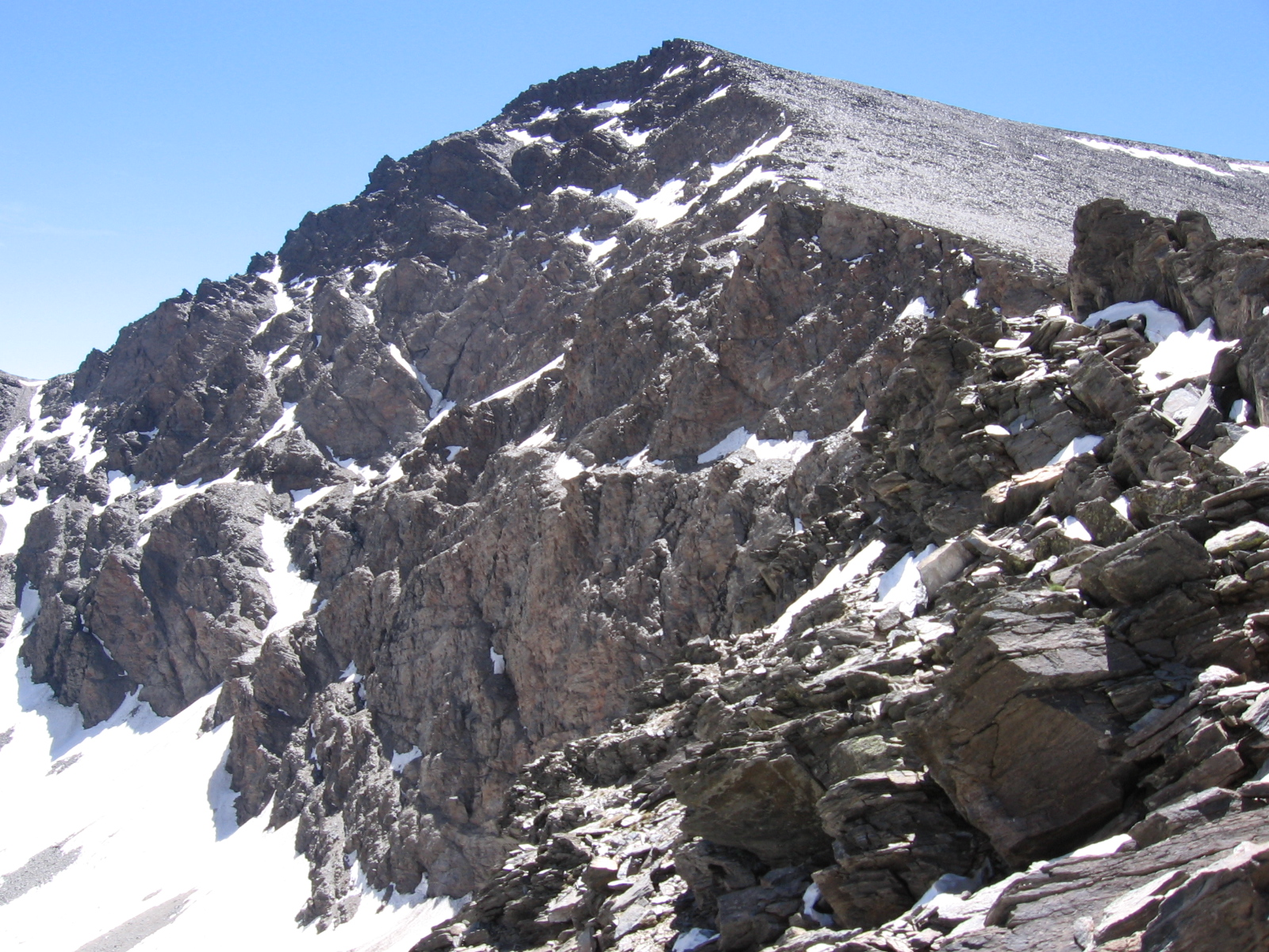 Cara norte del Mulhacén desde la pista de Sierra Nevada